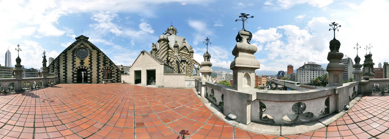 Palacio de la Cultura Rafael Uribe Uribe